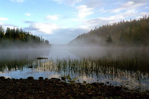 Sjaunja Foto:Vinterfrid